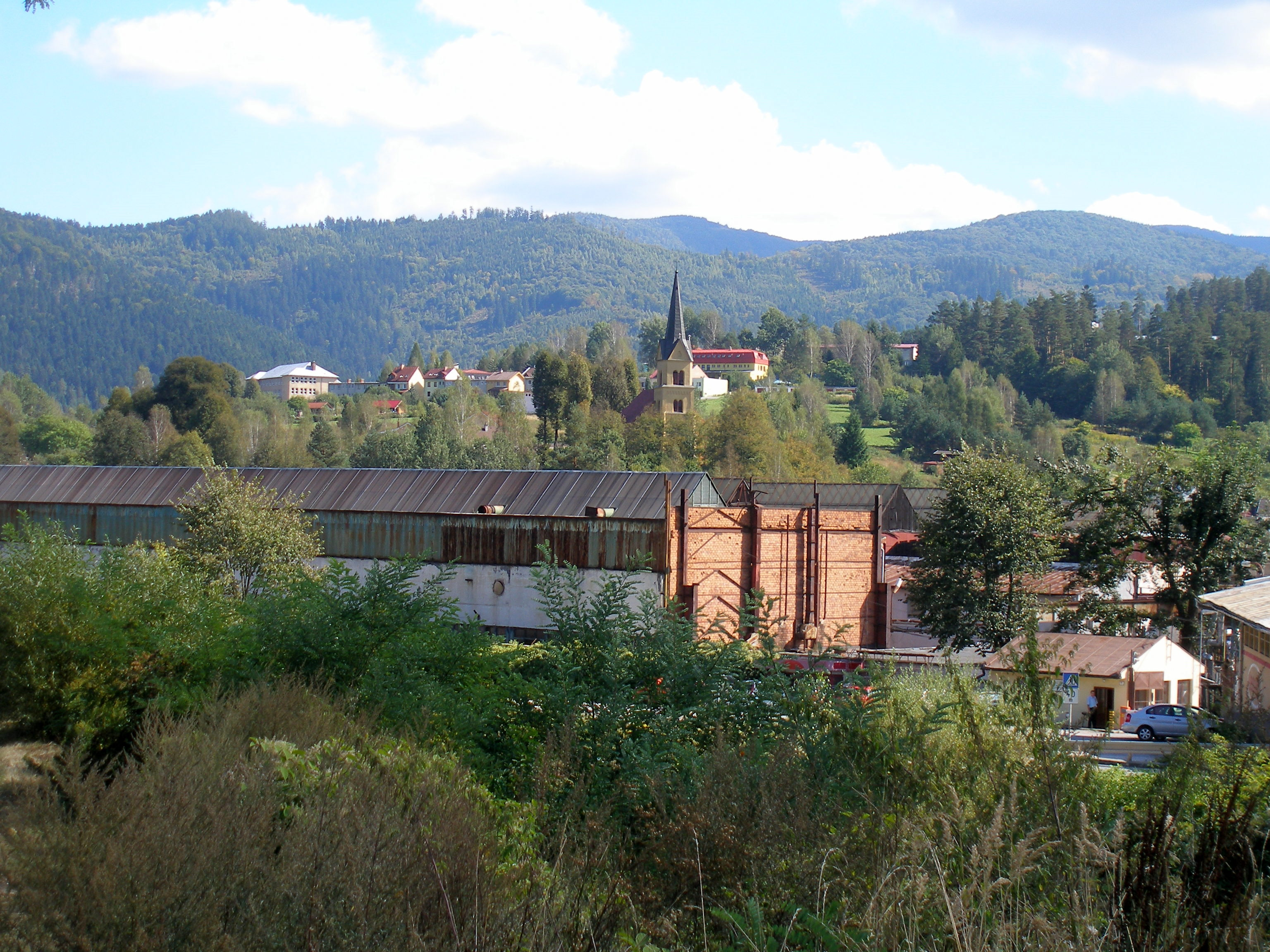 Spišská obec Prakovce. Okres Gelnica.